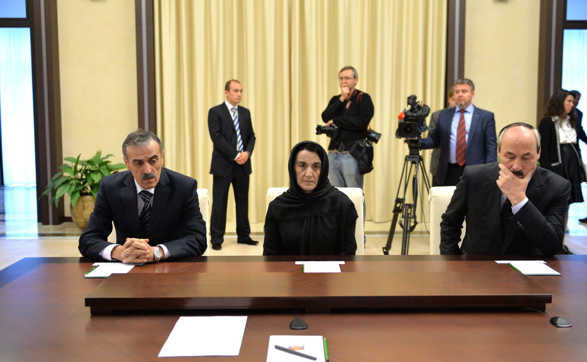 Родители Нурбагандова на приеме у Путина